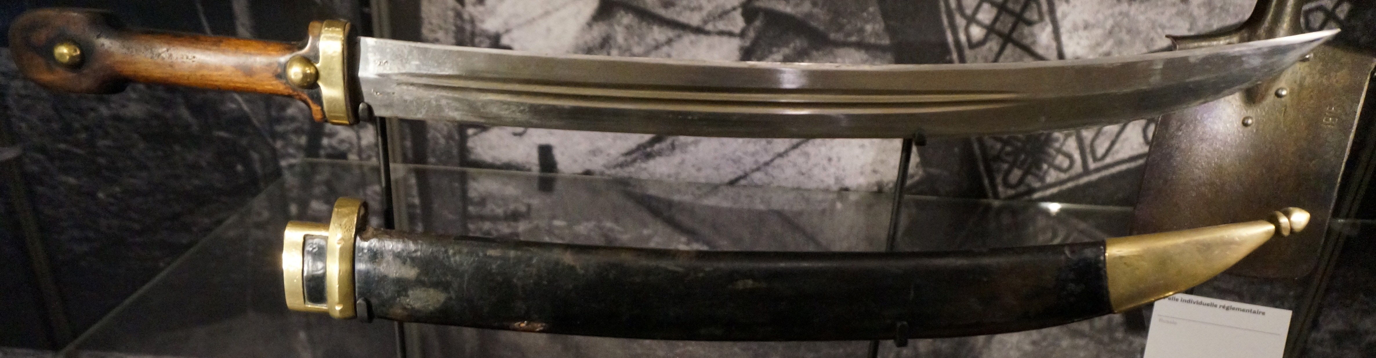 Au Fort de la Pompelle, sorte de grand couteau porté par les mitrailleurs.